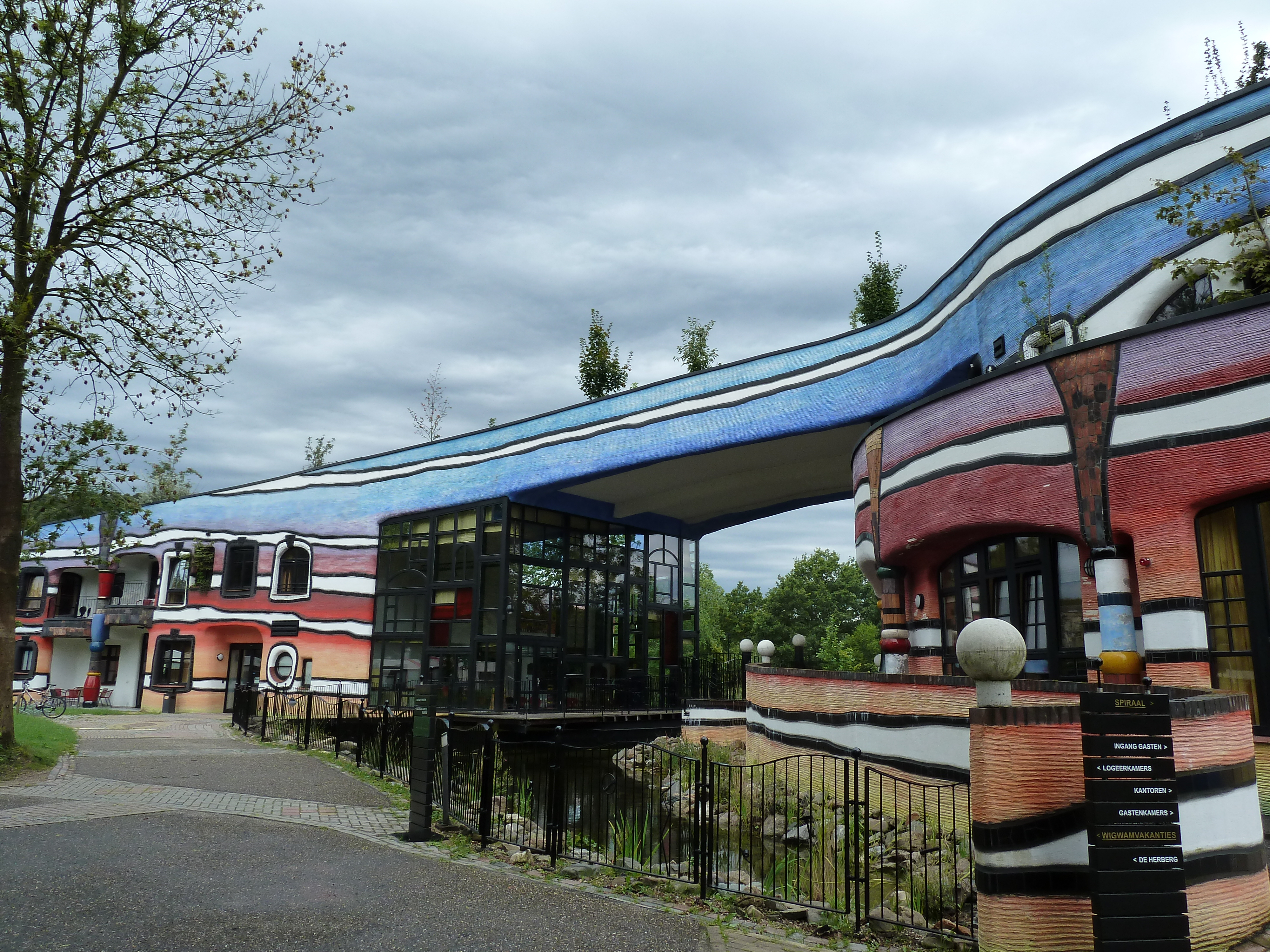 Ronald McDonald Kindervallei, Houthem, Valkenburg aan de Geul, Nederland